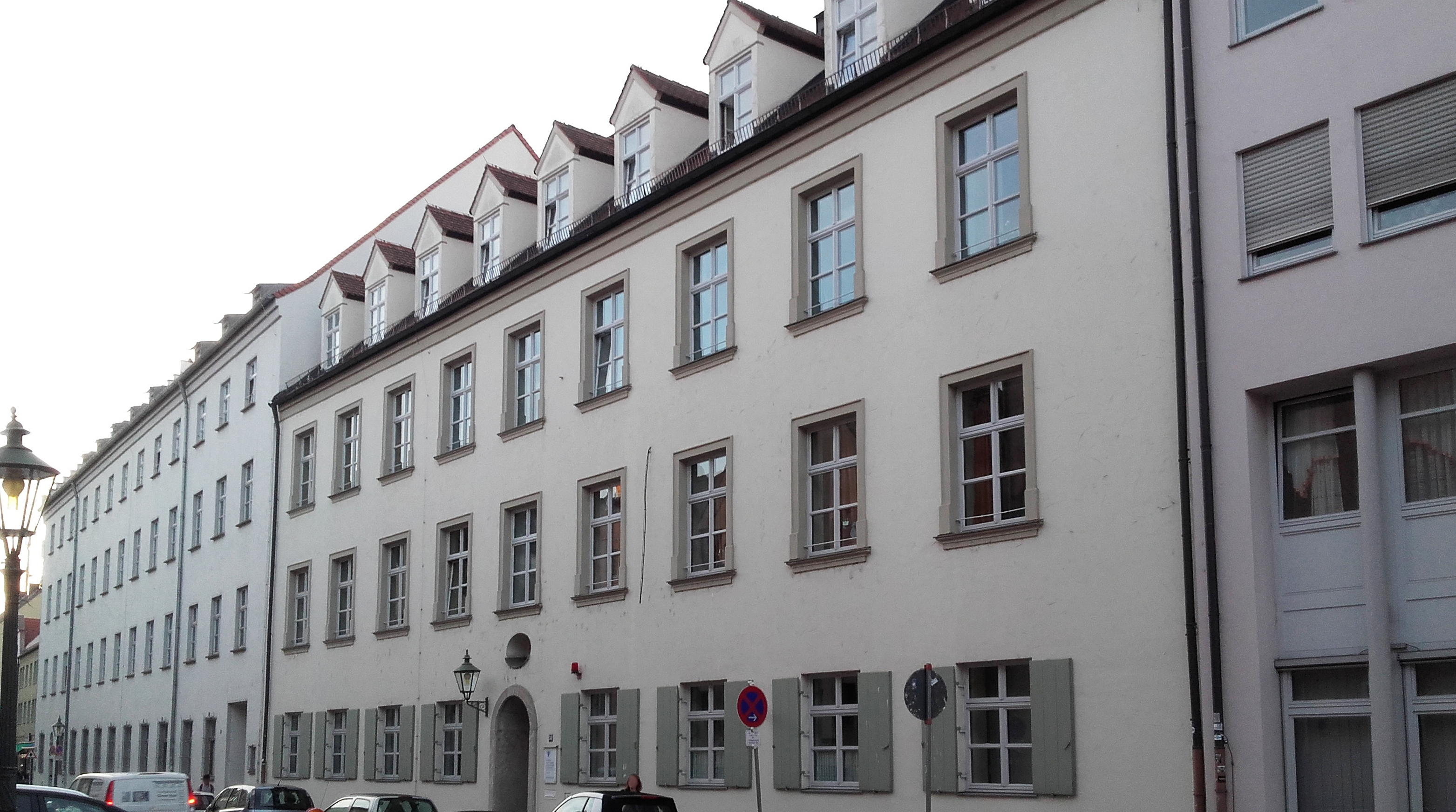 Blick auf das Vordergebäude der Waisen- und Armenkinderhaus-Stiftung Augsburg (St. Gregor Kinder-, Jugend- und Familienhilfe)